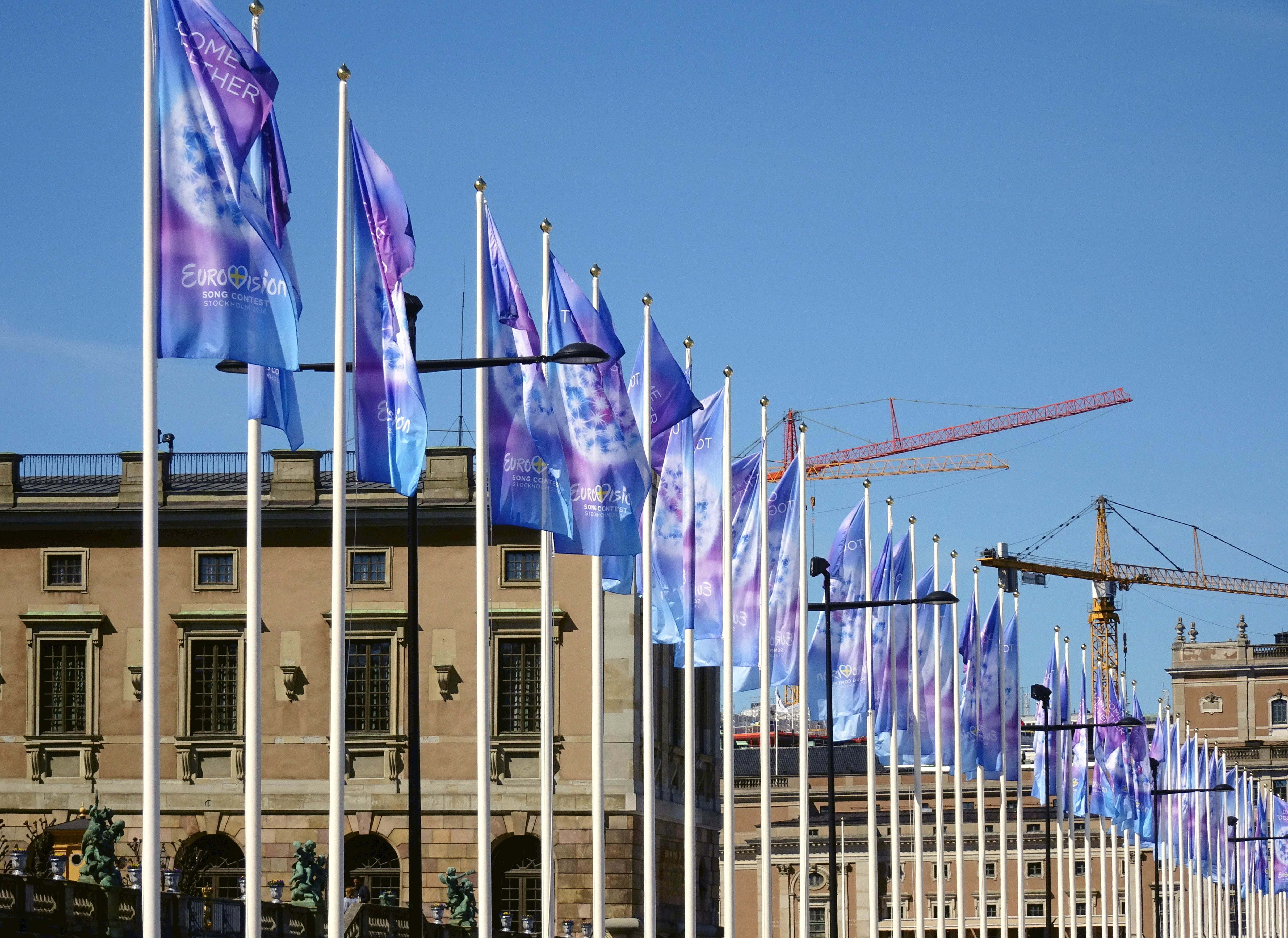 Skeppsbron Stockholm i samband med Eurovision Song Contest 2016